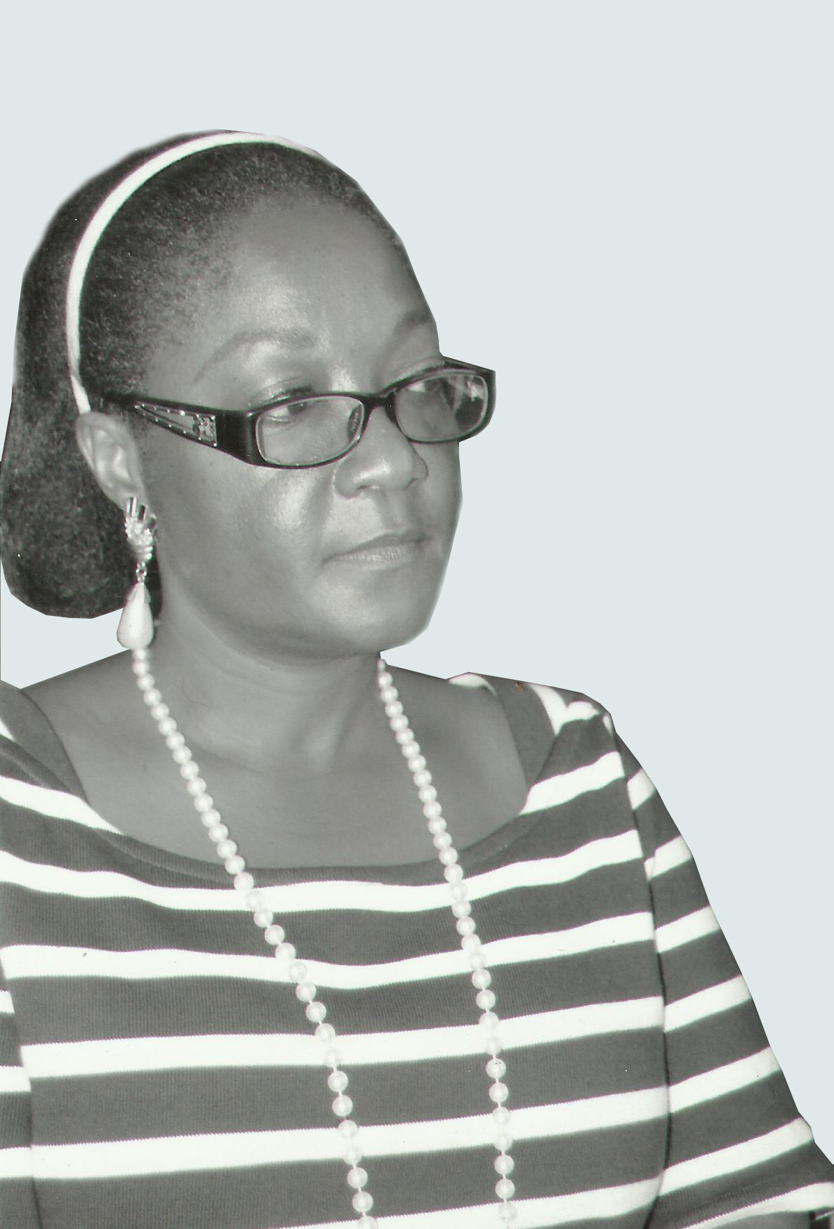 Successeur de monsieur Agnero Akpa Ambroise ancien Directeur de la BNCI